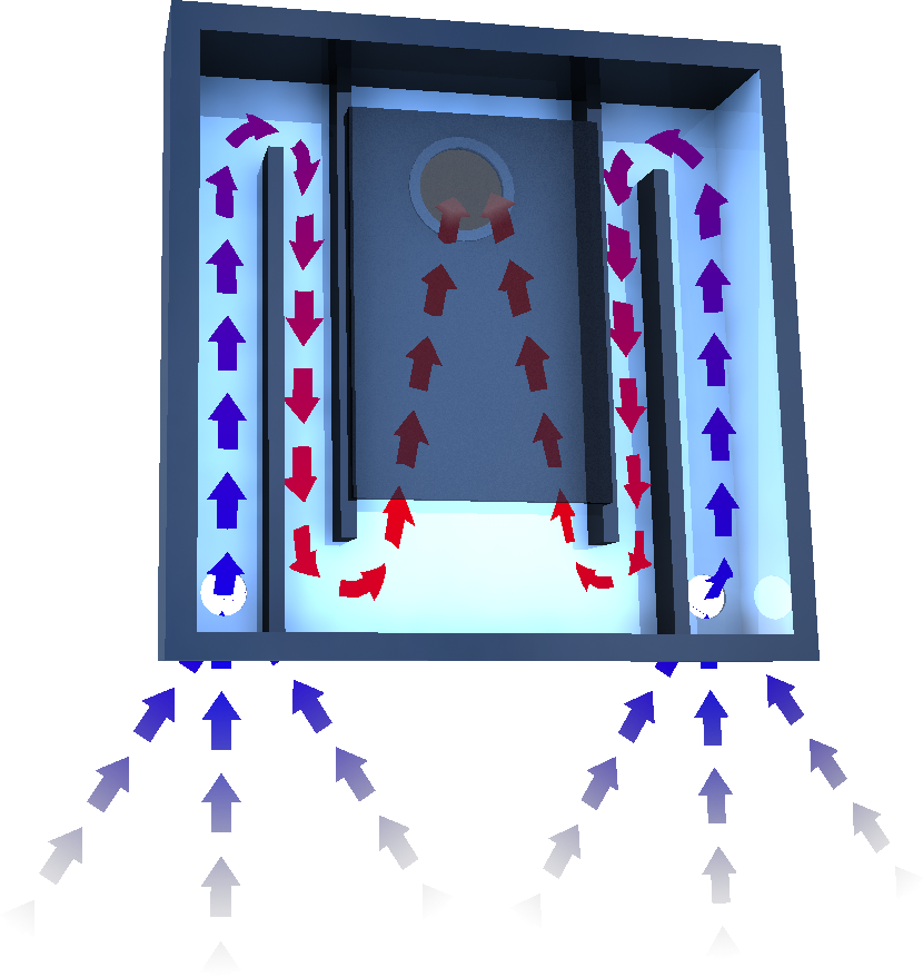 solventilationskasse